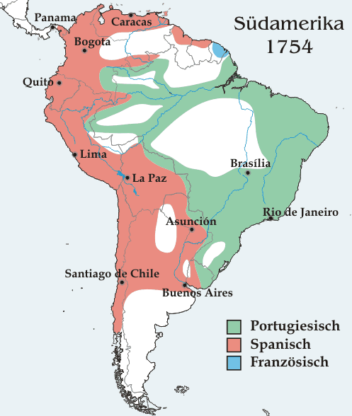 Südamerika, Kolonisation um 1754